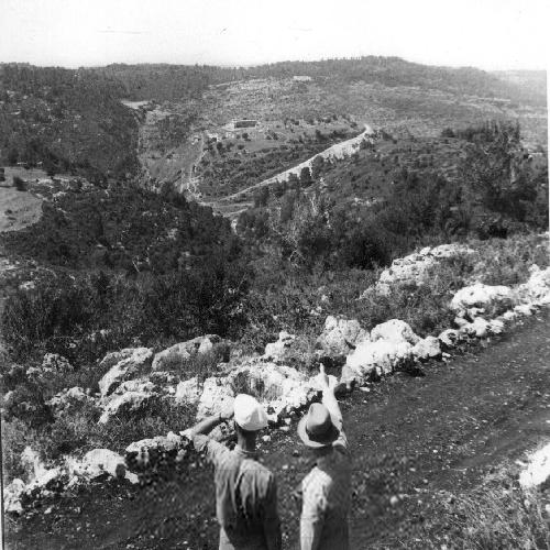 יערות הכרמל צילם טים גידל 1937 (בתוך אלבום יערות הכרמל - נהריה)